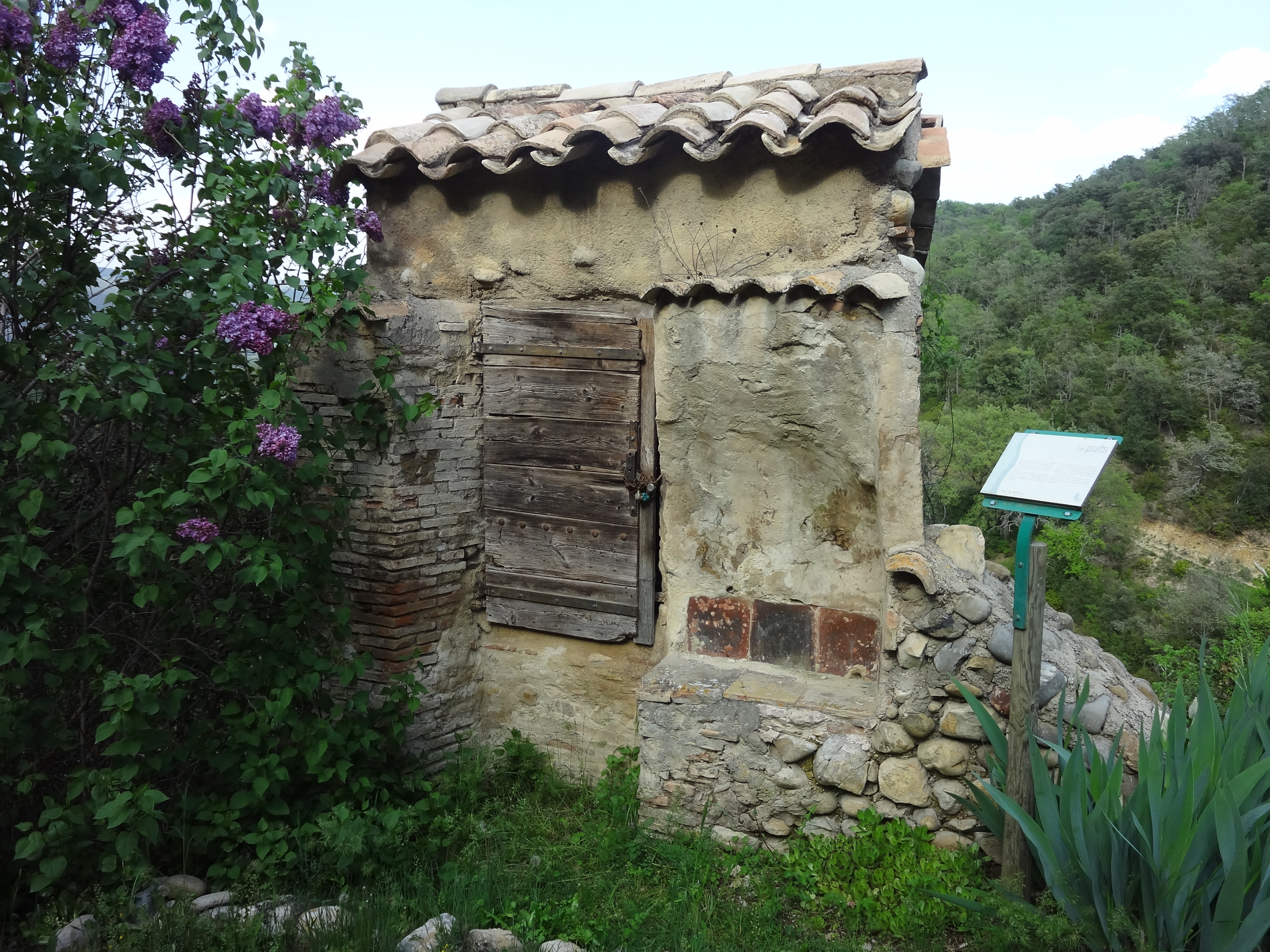 Puit fermé